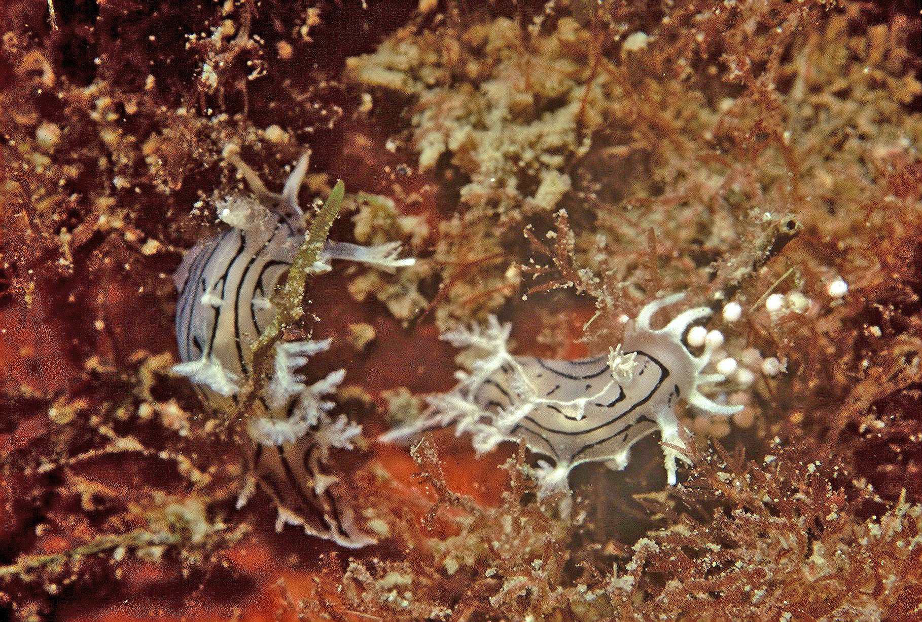 Maasella edwardsi pond des oeufs blancs et l'observation personnelle m'a permise de trouver l'un de ses prédateurs, un mollusque : Tritonia striata